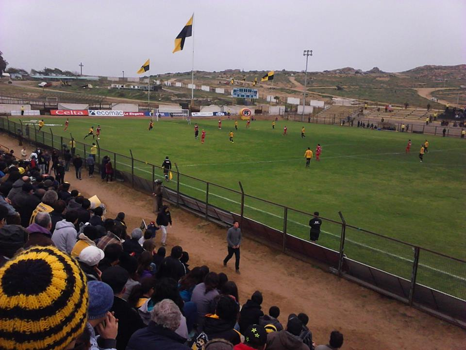 Estadio Municipal La Pampilla de Coquimbo